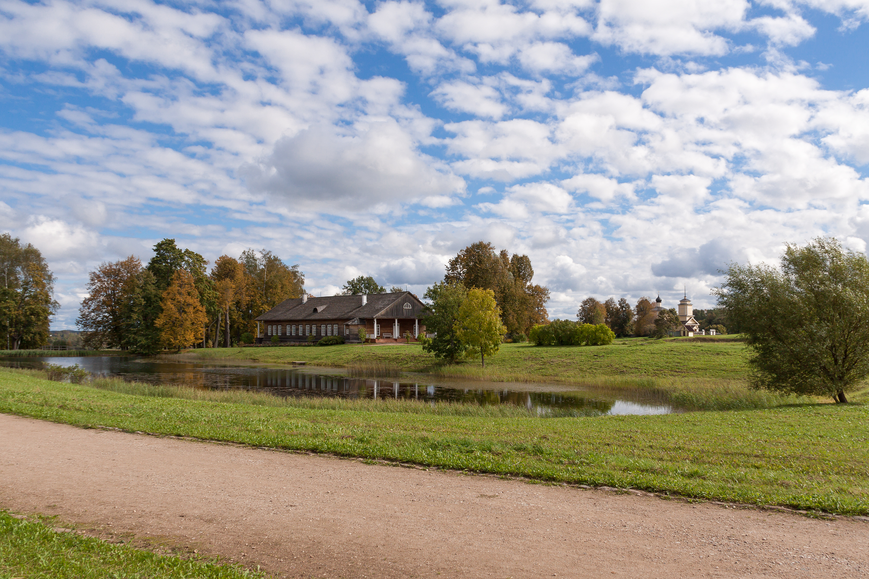 Усадьба Осиповых-Вульф: Тригорское, Пушкиногорский район, Псковская область